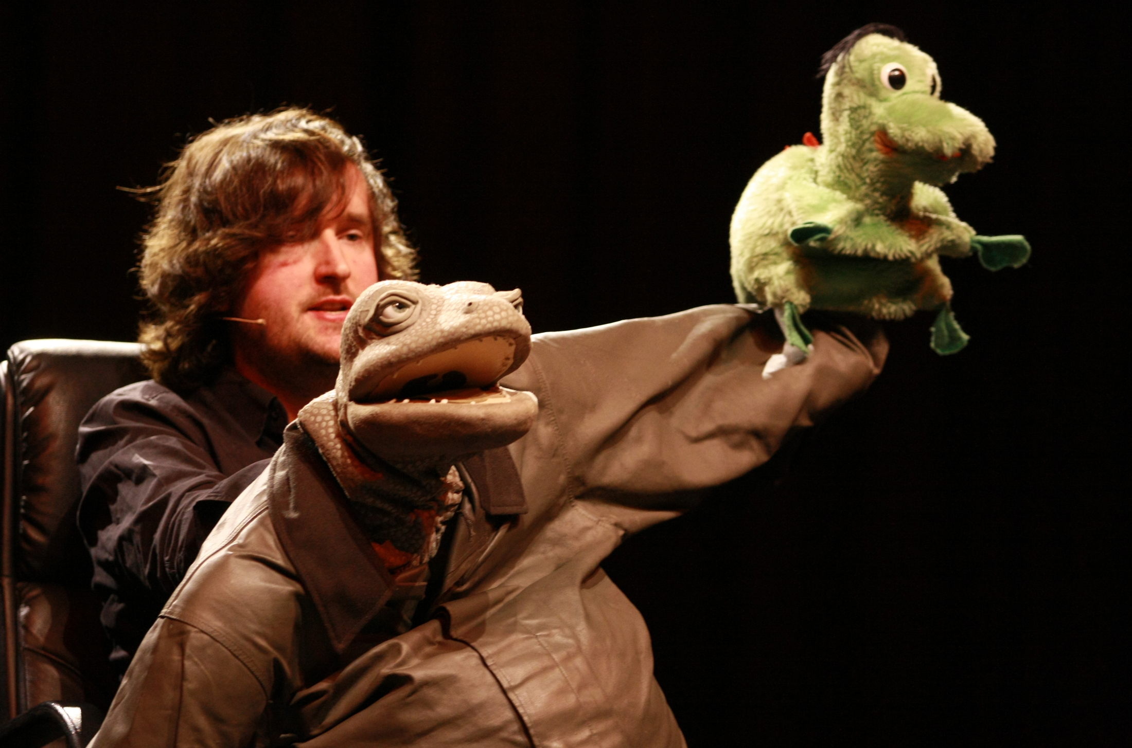 Michael Hatzius, deutscher Puppenspieler und Schauspieler. Hier mit der Klappmaulpuppe "Die Echse" (und dem kleinen Krokodil). Auftritt am 24.01.2012, Kulturbörse Freiburg, Theatersaal 1